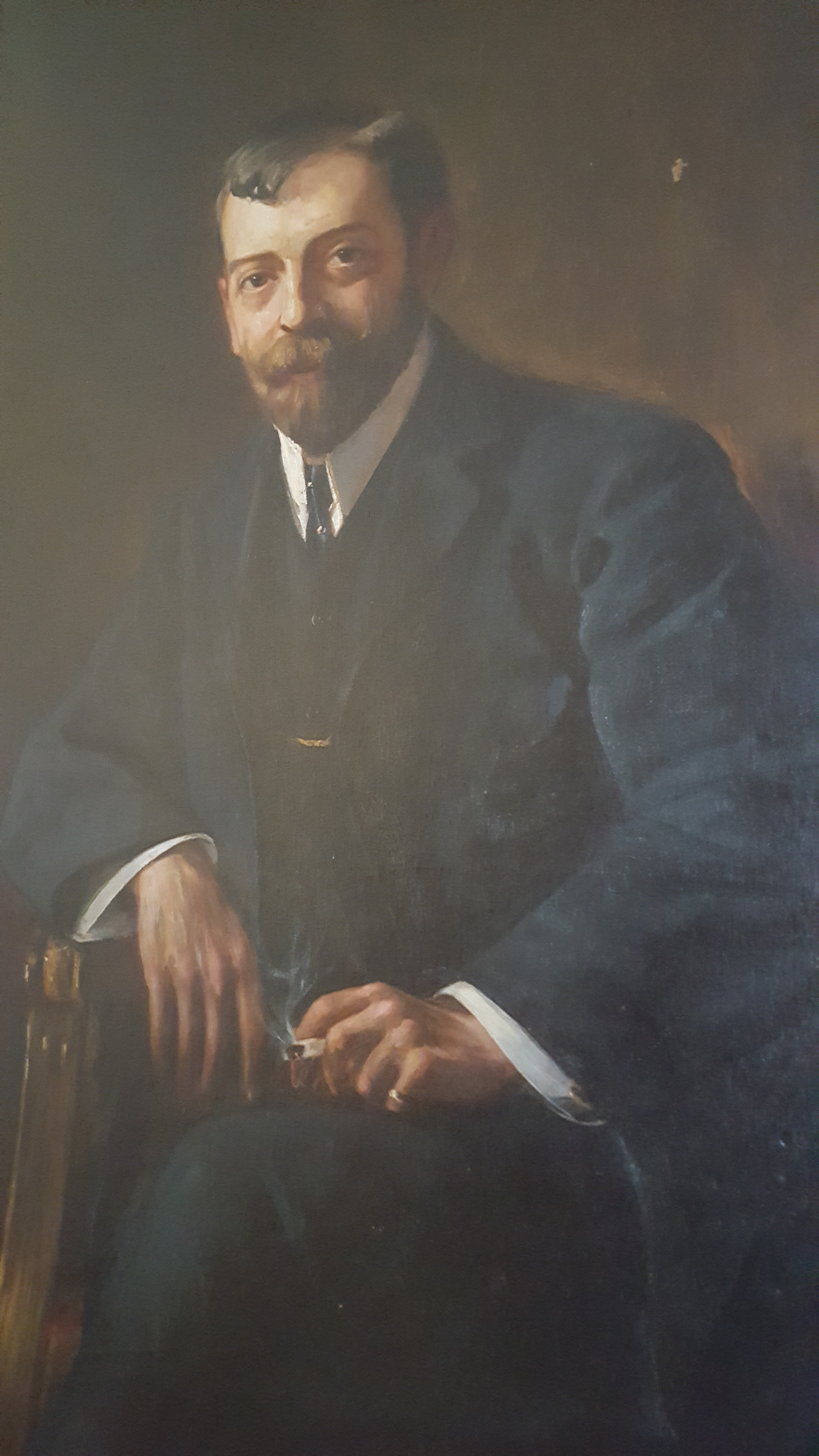 Retrato del ilustre periodista don Rafael Guerrero Carmona